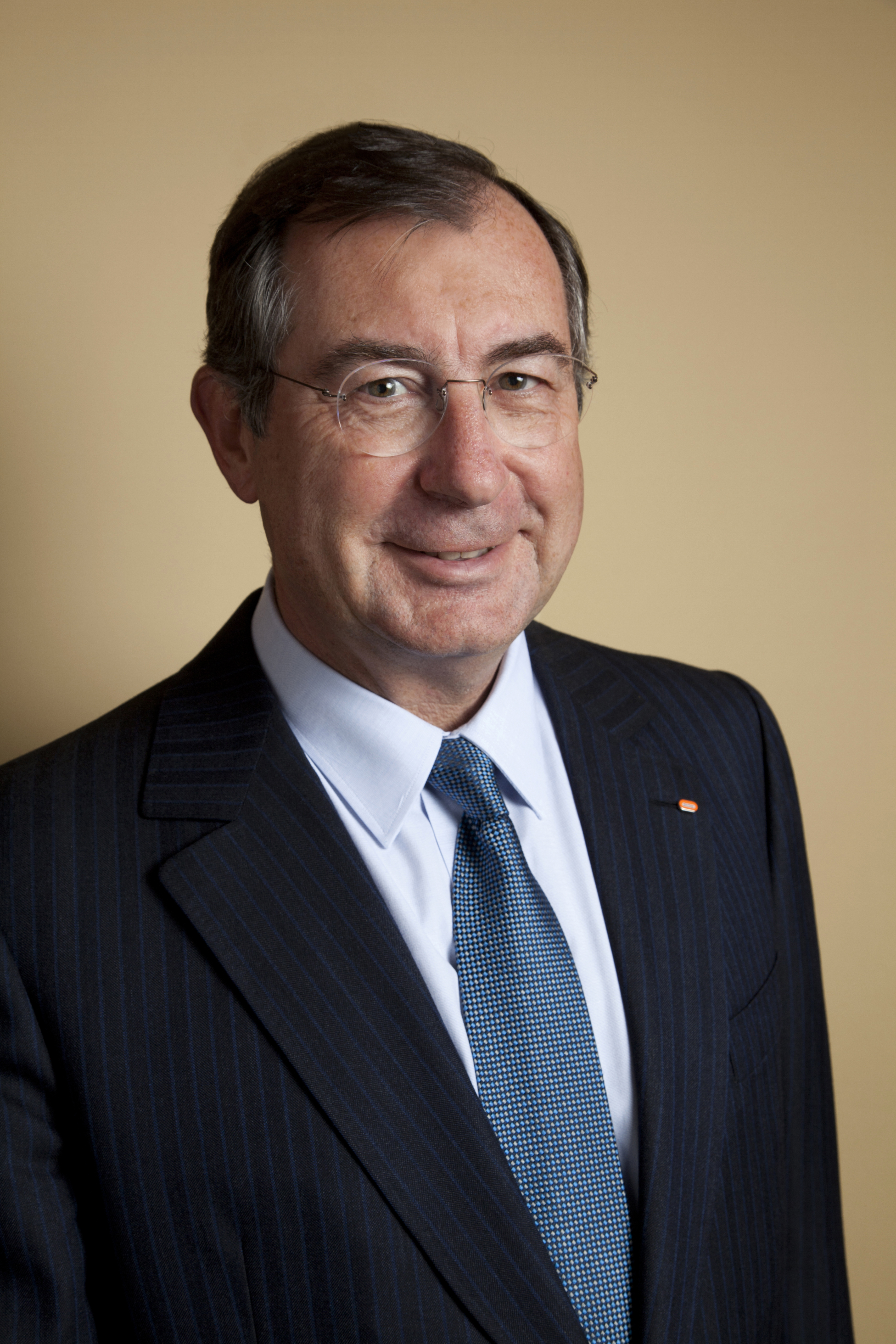 Portrait officiel de Martin Bouygues (Président-directeur général du groupe Bouygues)